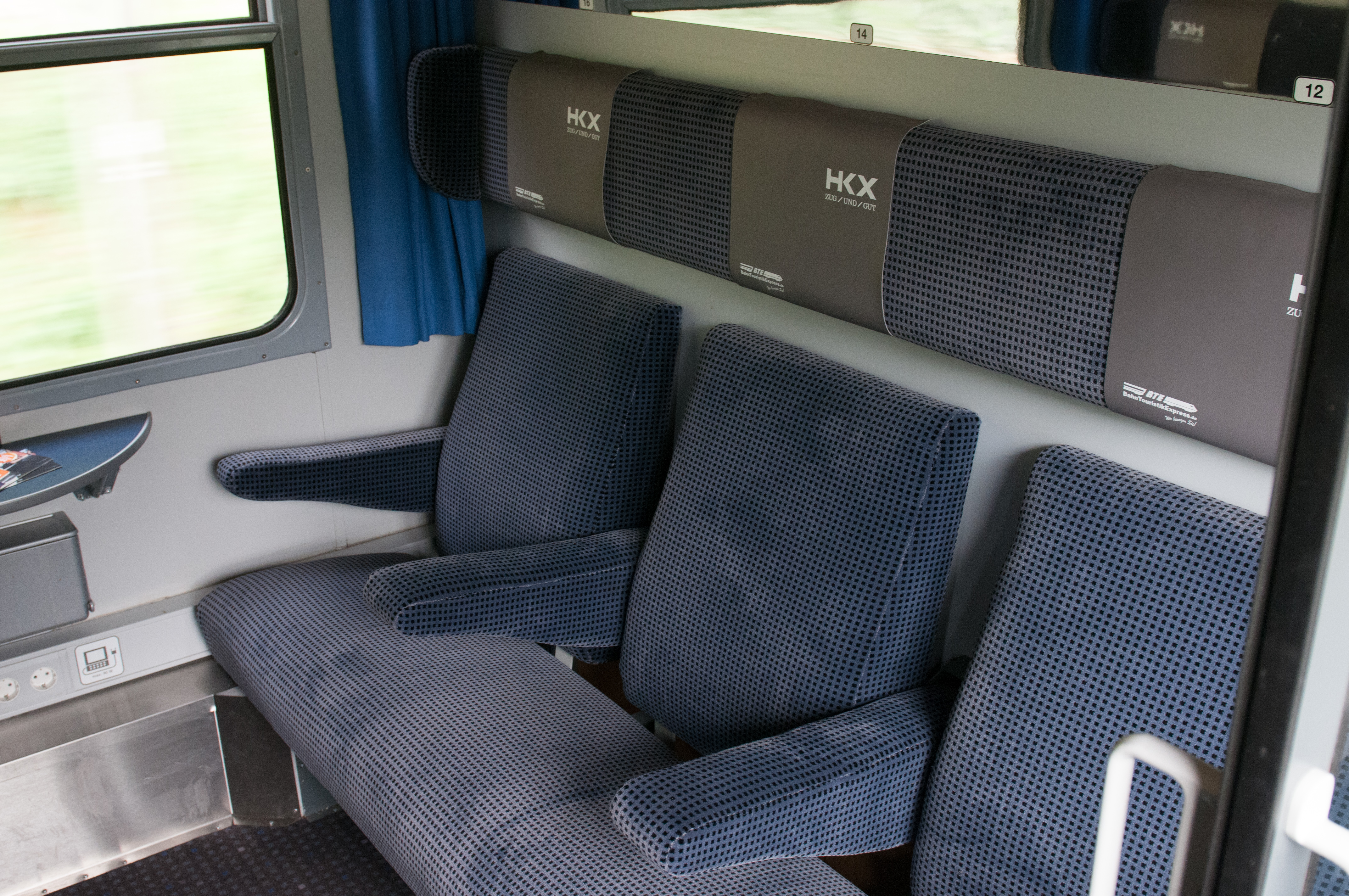 Hamburg-Köln-Express: Mitfahrt am 26. Mai 2016 mit Genehmigung der Pressestelle